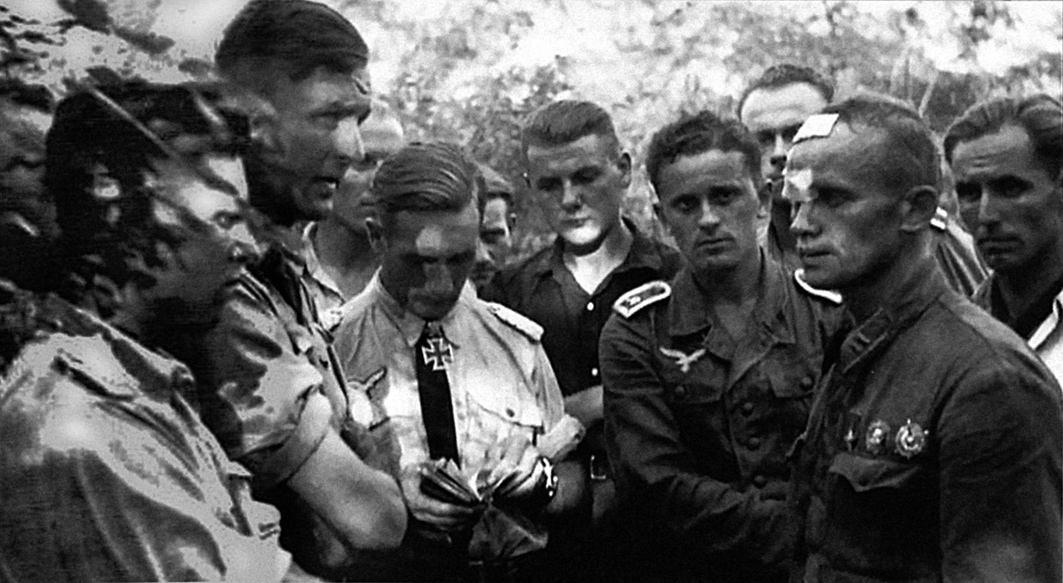 Герой Советского Союза майор Антонов Яков Иванович в немецком плену во время первого допроса, 1942 год